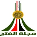 شعار لمجلة الفتح العامة